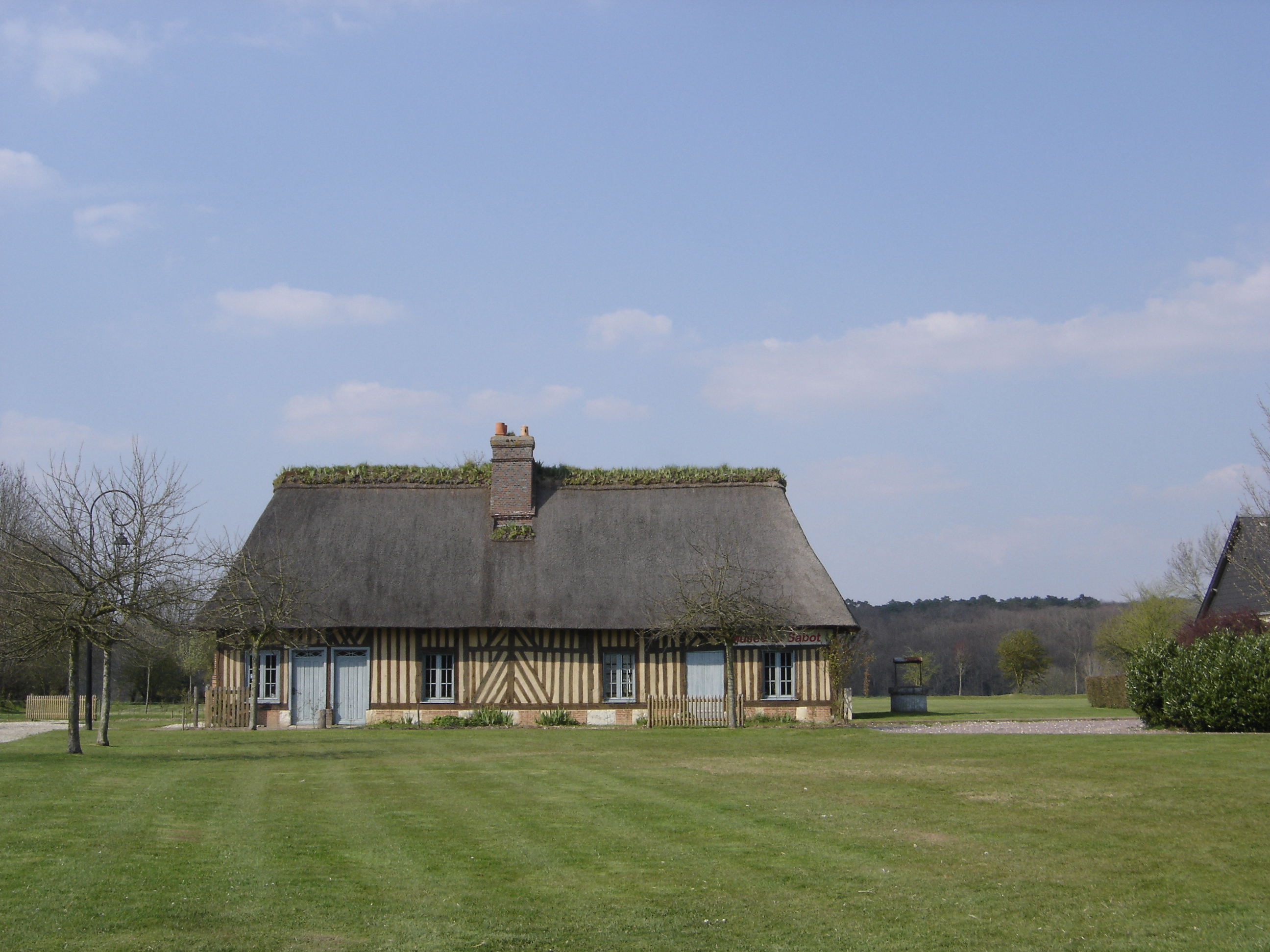 Musée du sabotier, à La Haye-de-Routot, Eure (France)